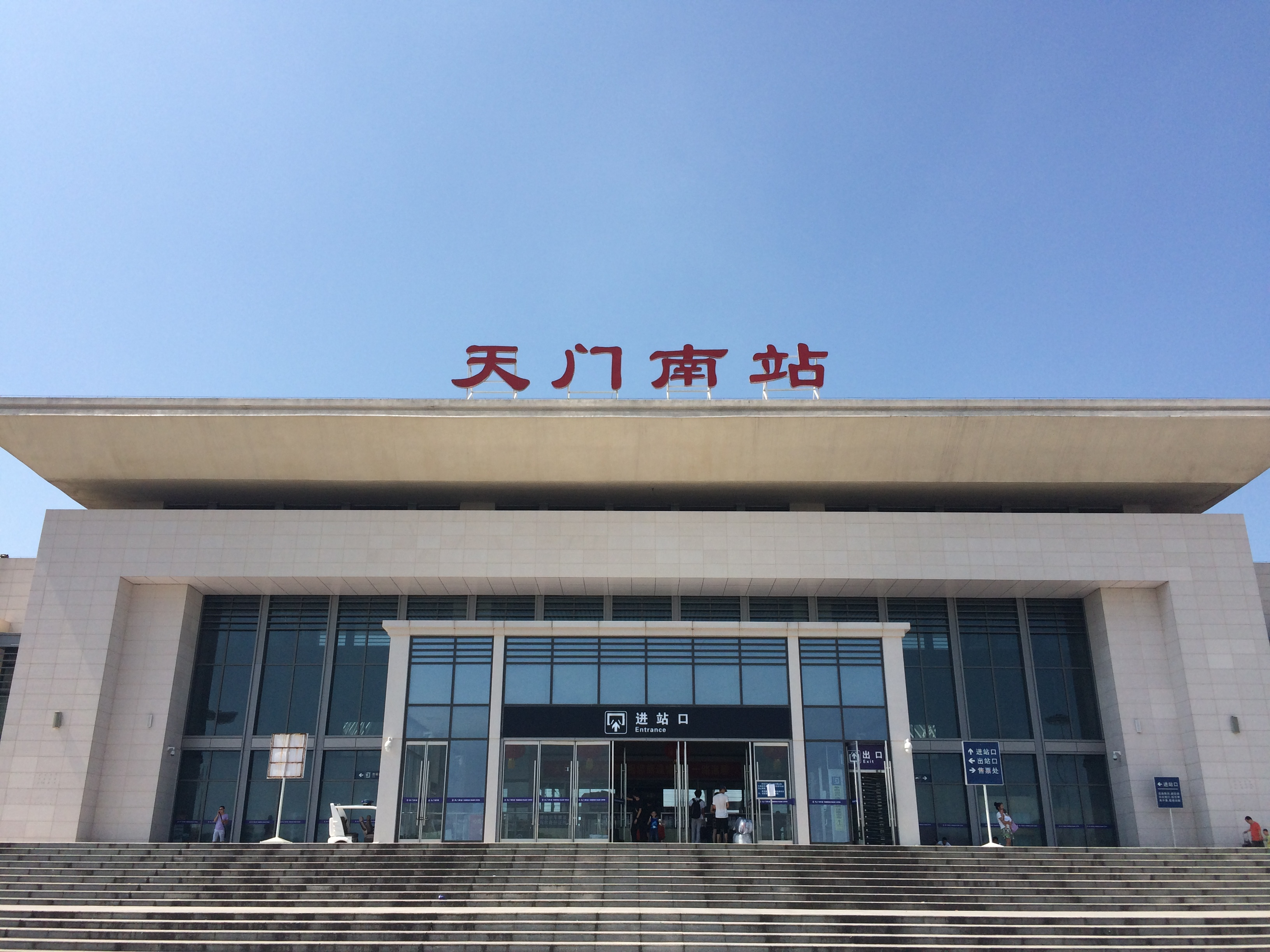 天门南站进站大厅